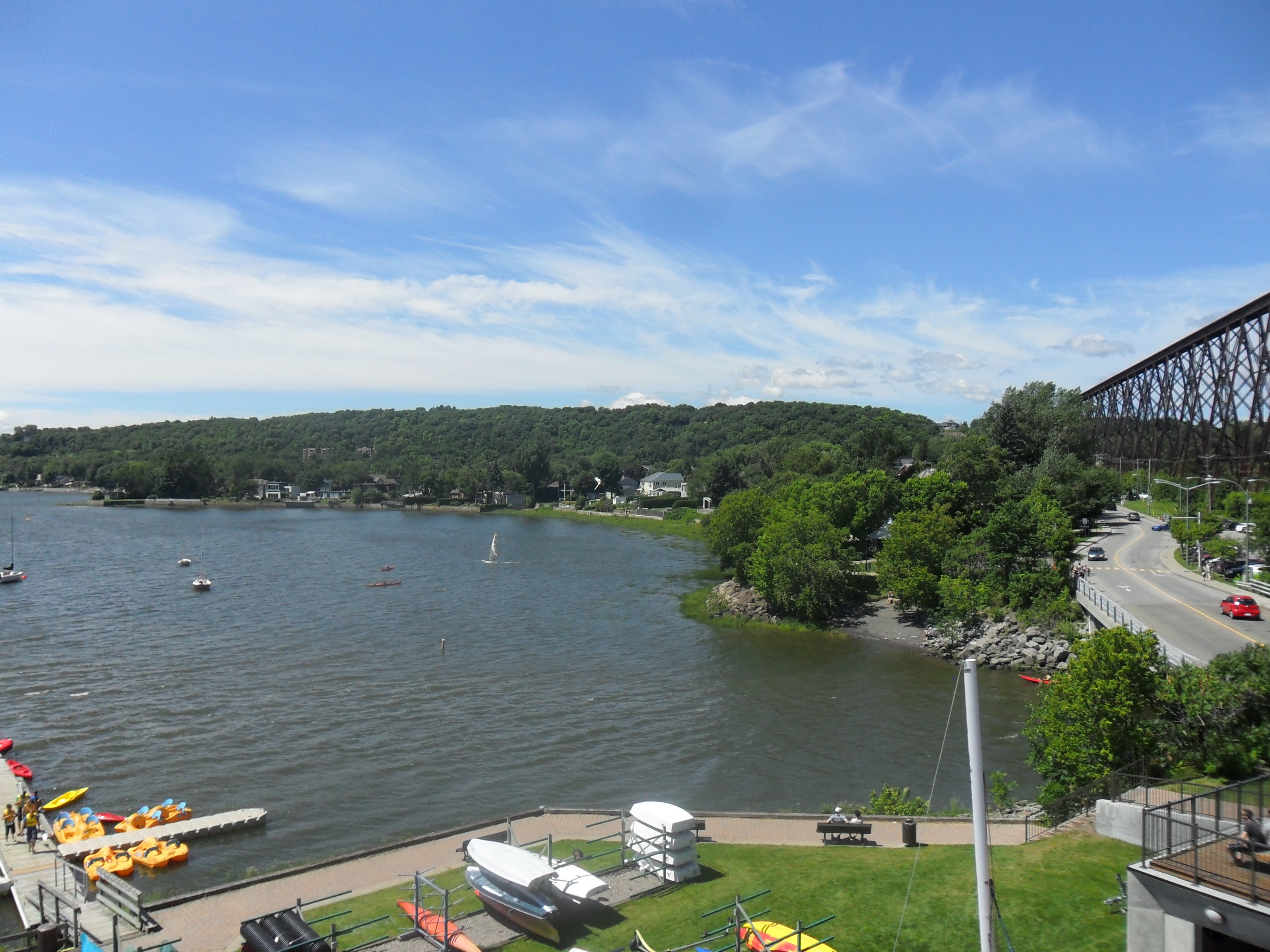 Anse du Cap Rouge et embouchure de la rivière du Cap Rouge, à Québec.